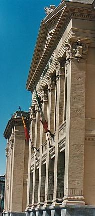 Messina Palace Municipale